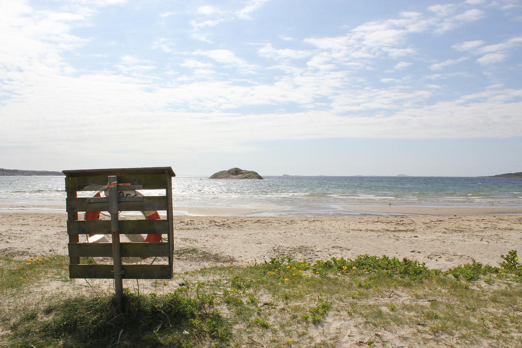 Saved